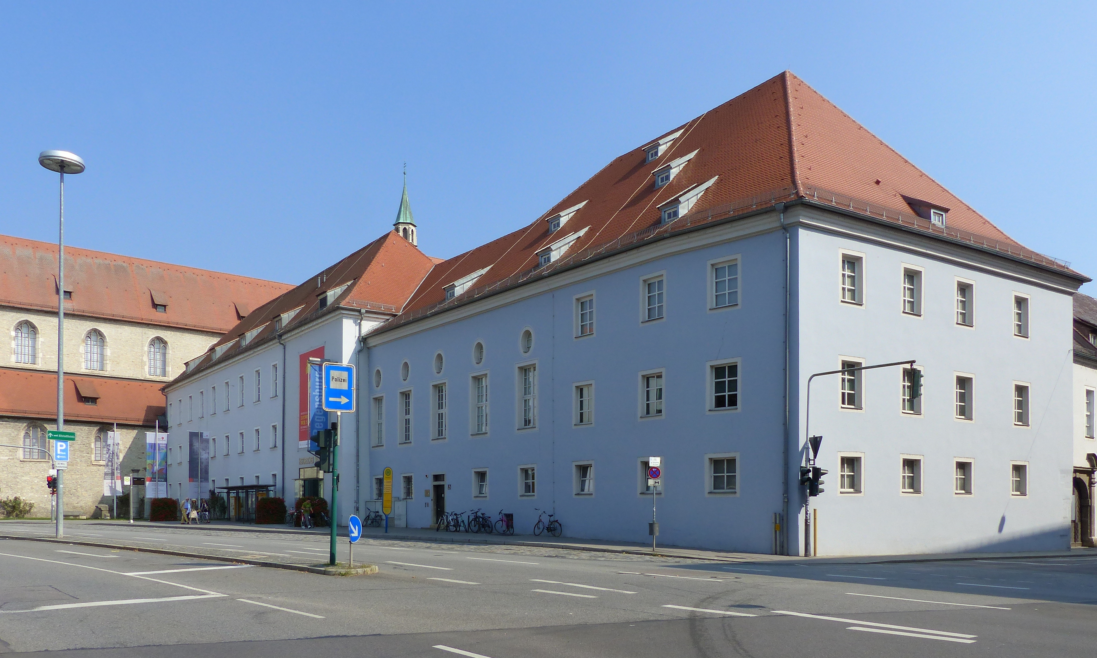 Historisches Museum RegensburgThis is a photograph of an architectural monument.